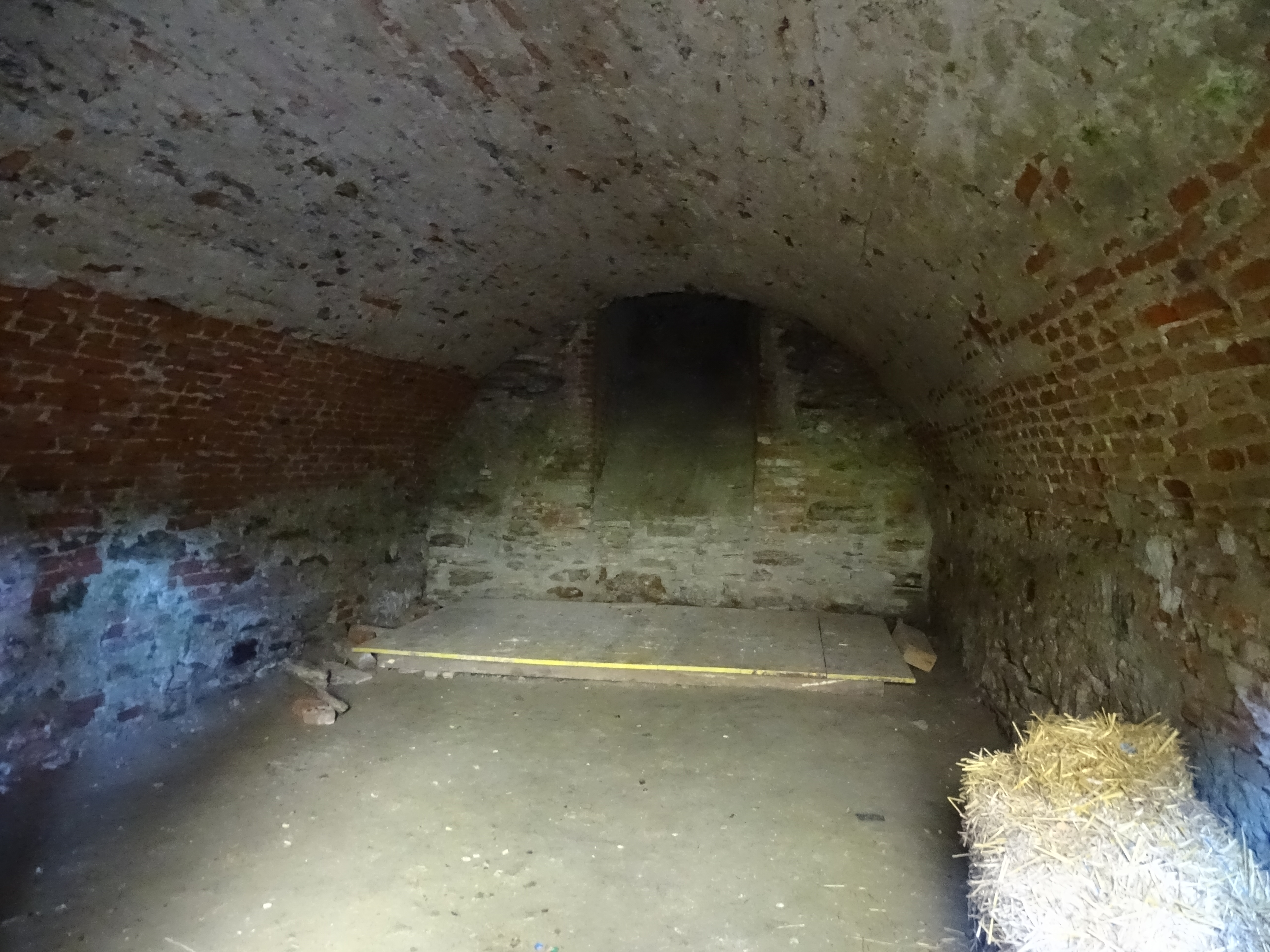 Der tonnengewölbte und fensterlose Keller des Bergfriedes der Burg Ligist.